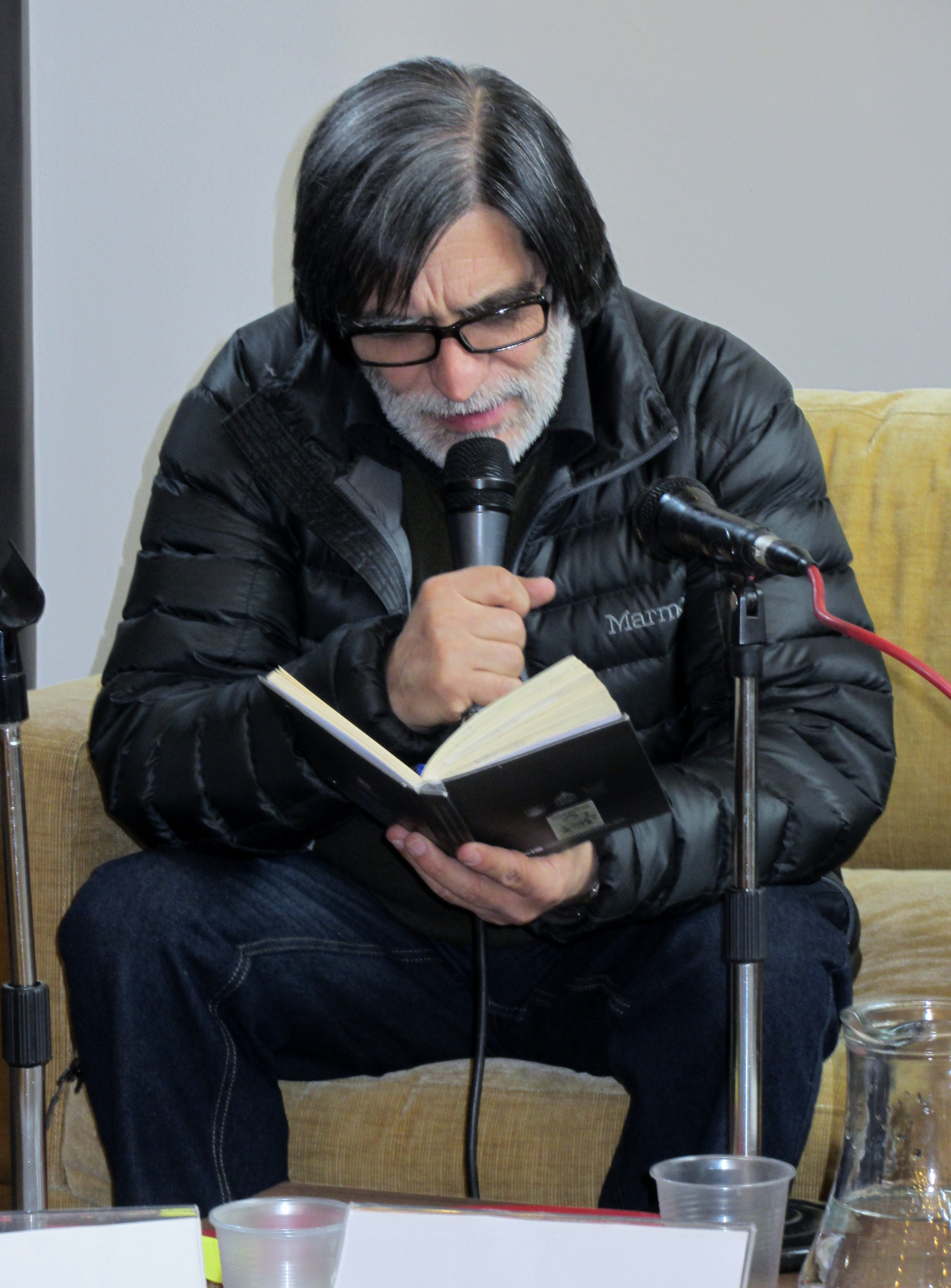 El poeta chileno Jorge Montealegre en la Feria Internacional del Libro de Santiago 2015